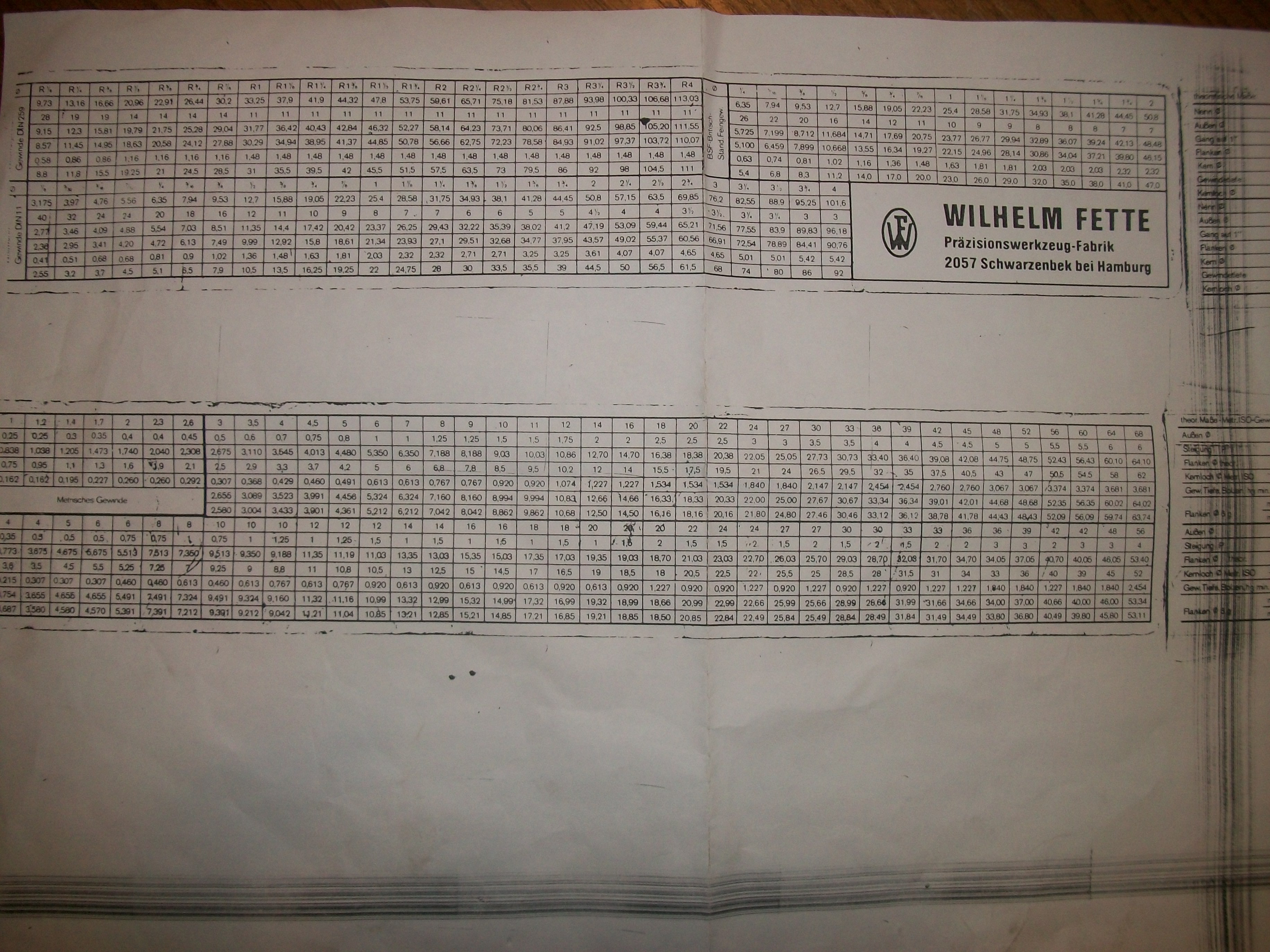 Gewindetafel von Wilhelm Fette GmbH, Präzisionswerkzeuge Nenngröße /Nenndurchmesser/Nenn-Ø Außen-Ø Gang of 1" (Gangzahl je Zoll) Flanken-Ø Kern-Ø Gewindetiefe Kernloch-Ø Gewinde Whitworth-Gewinde